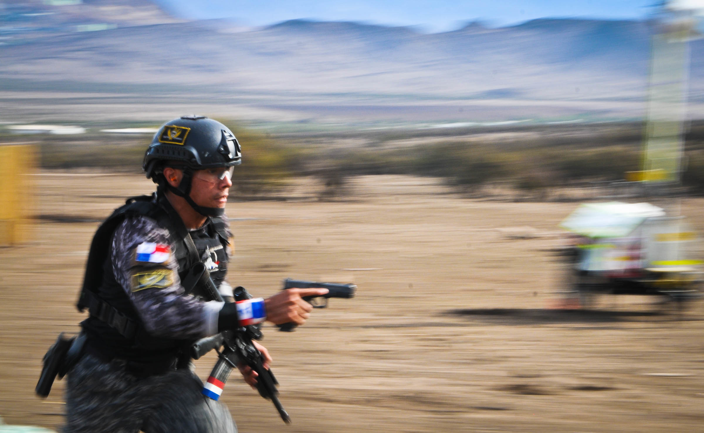 Unidad de la UFEC de la Policía Nacional de Panamá utilizando Glock 17 y la carabina M4 en Fuerzas Comando 2018